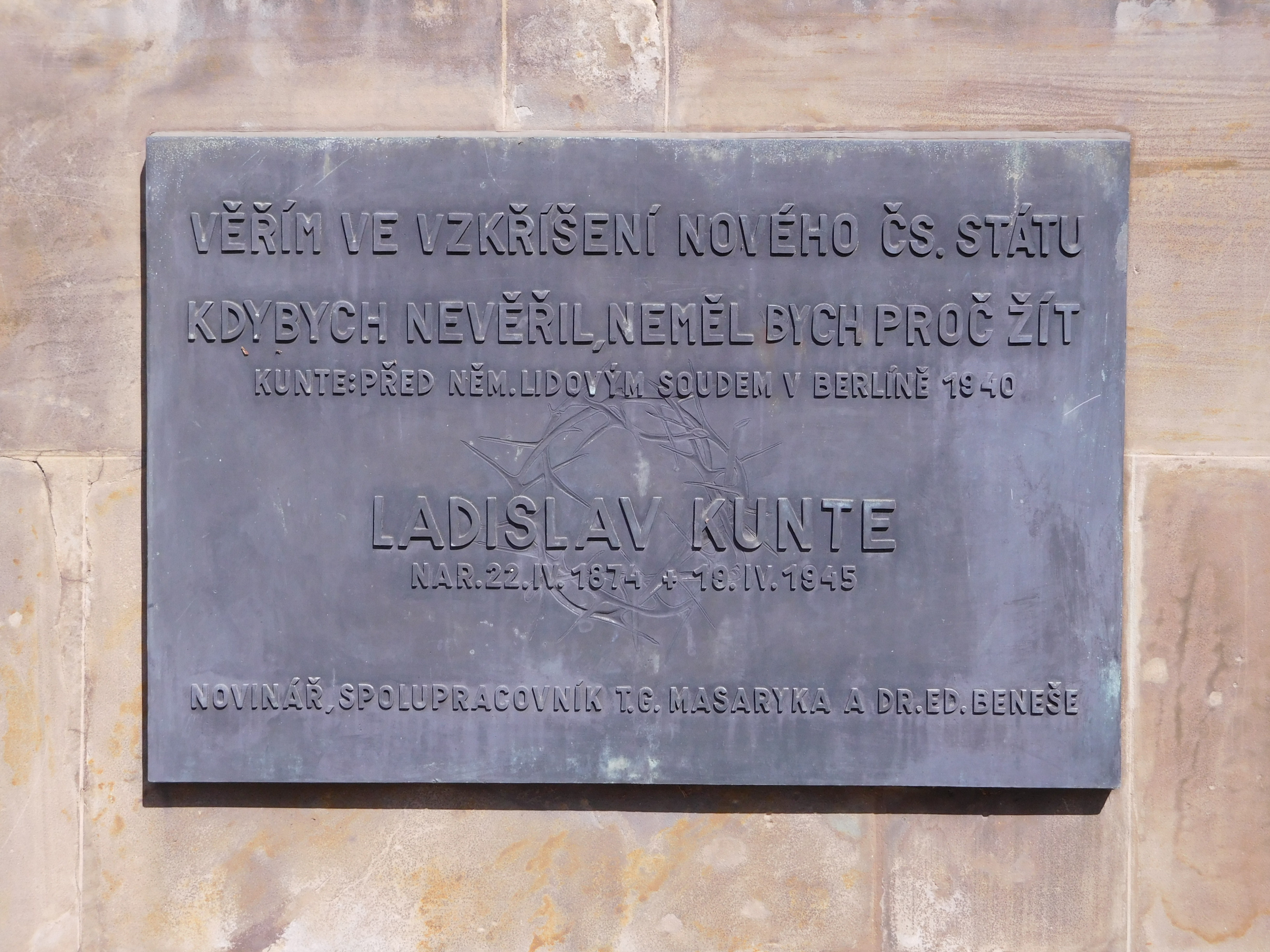 Praha - Modřany, pomník obětem 2. sv. války - pamětní deska Ladislava Kunteho